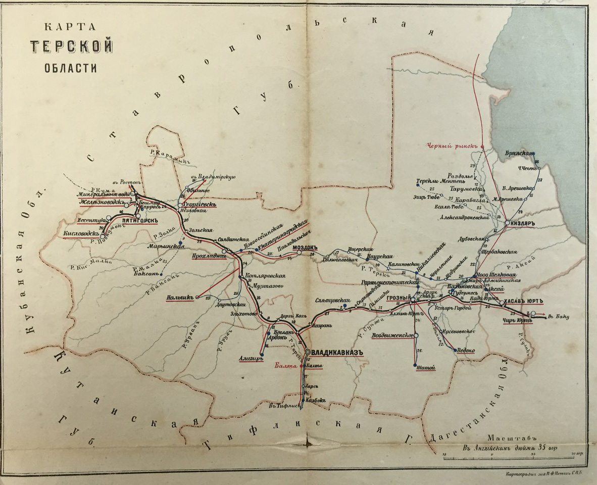 Карта Терской области